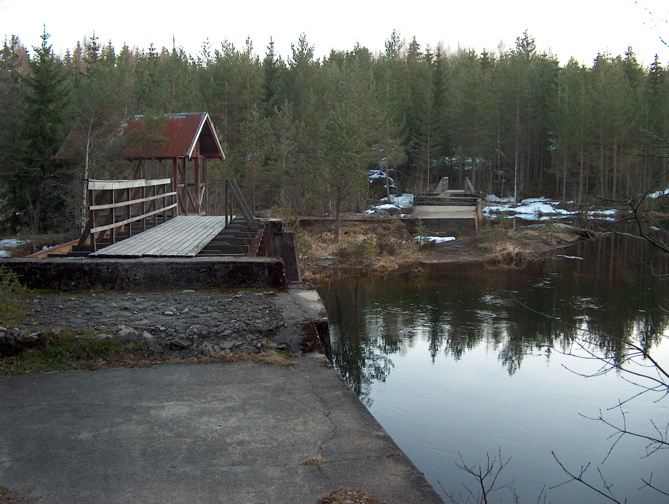 Torevassdammen i Rudsvassdraget